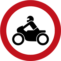 Zeichnung von Verkehrszeichen aus Luxemburg